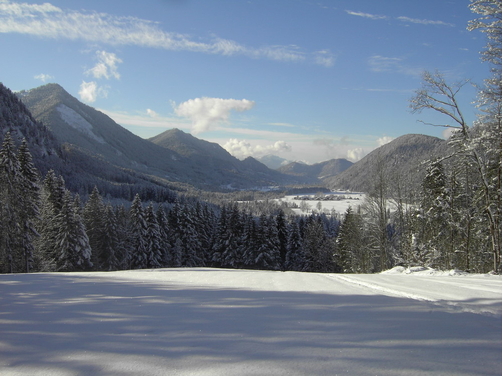 Das Jachental von Ost nach West, im Mittelpunkt der Ortsteil Höfen